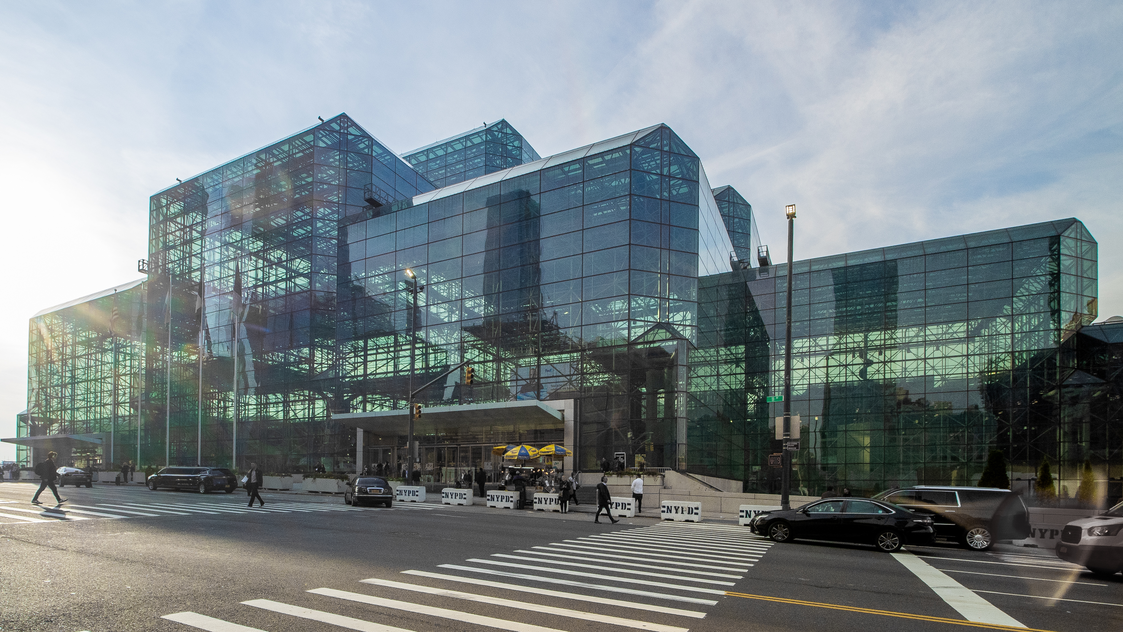 Hells Kitchen, Manhattan, NYC